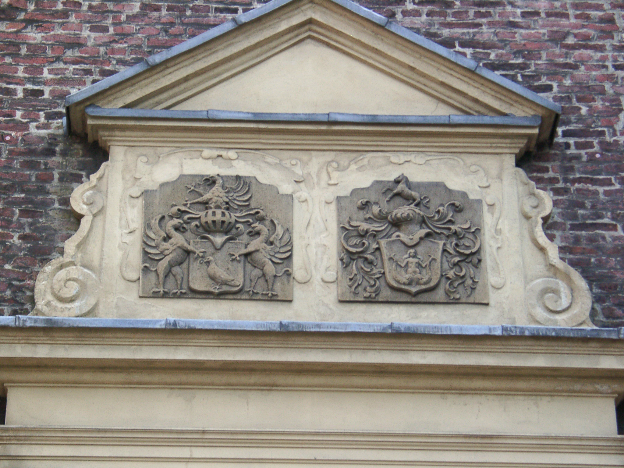 Wappen über dem Hauptportal von Schloss Neersen - selbst fotografiert (16.5.2005)